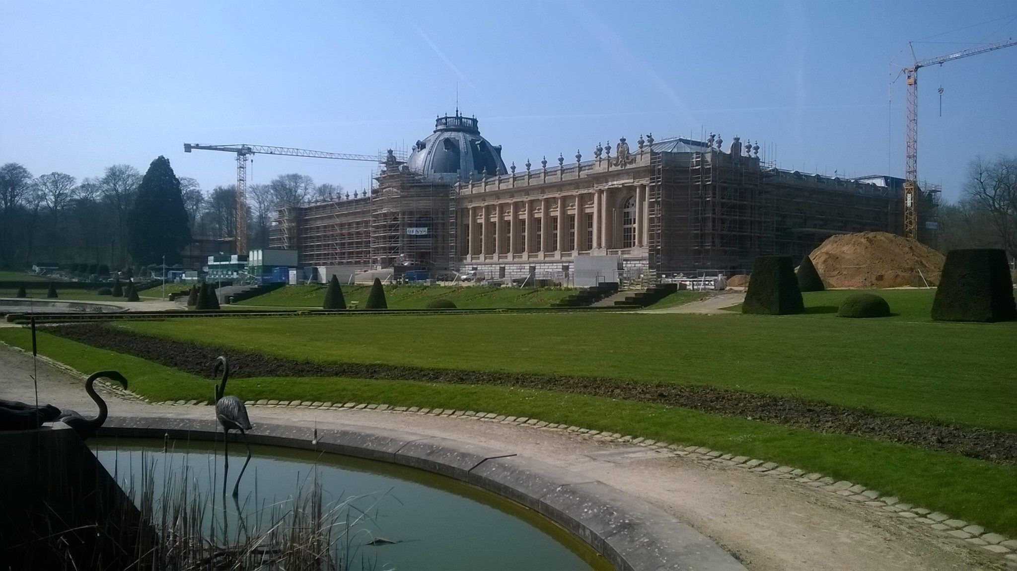 Koninklijk Museum voor Midden-Afrika